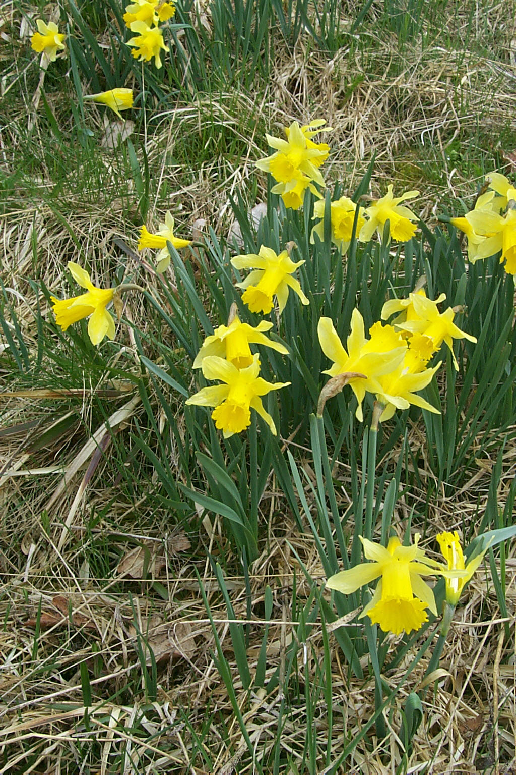 Wilde Narzissen, natürlich vorkommend im Perlenbachtal, Naturschutzgebiet „Perlenbach-Fuhrtsbachtal-Talsystem“